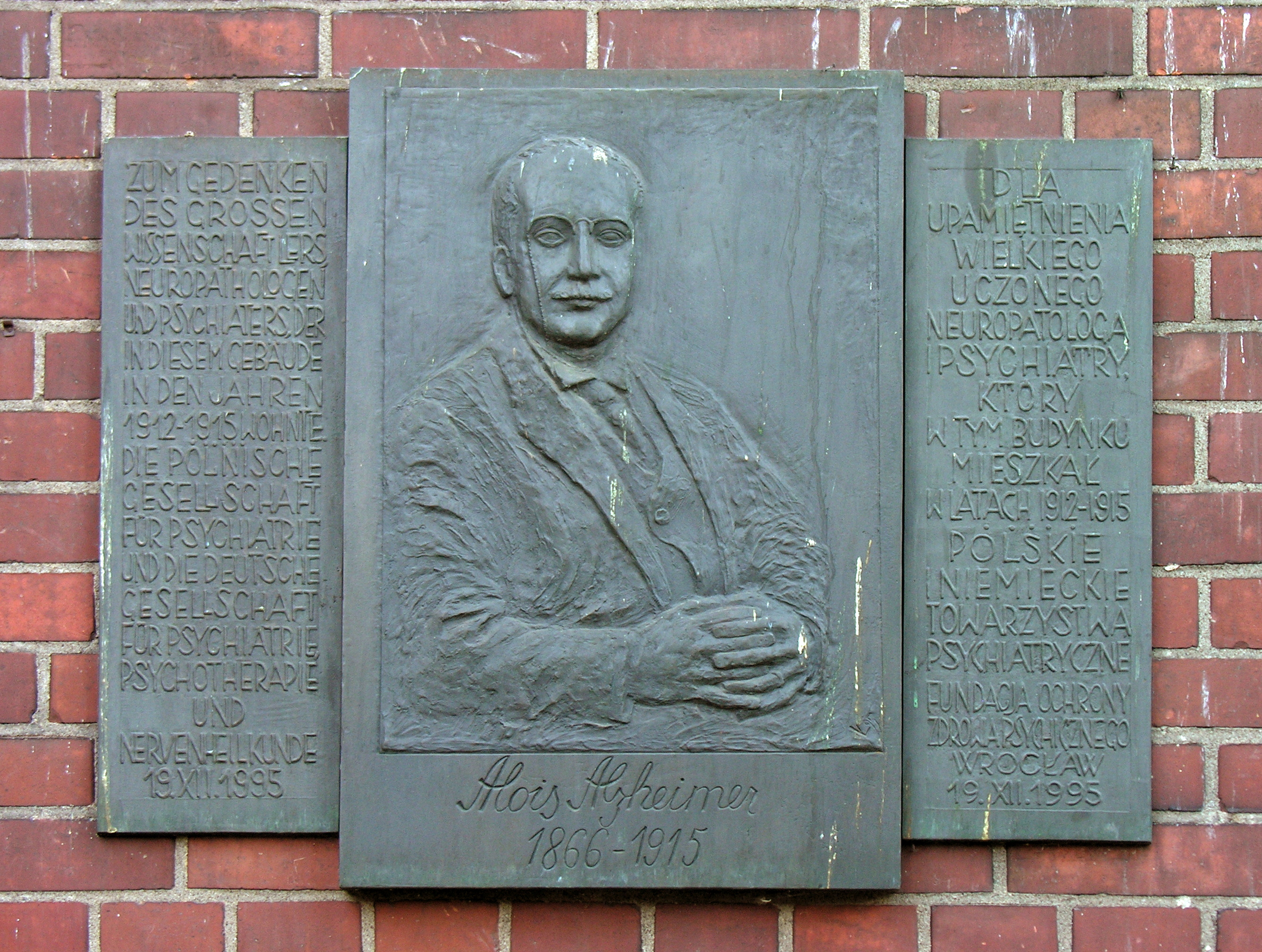 Tablica ku czci Aloisa Alzheimera, Wrocław, ul. Bujwida 42